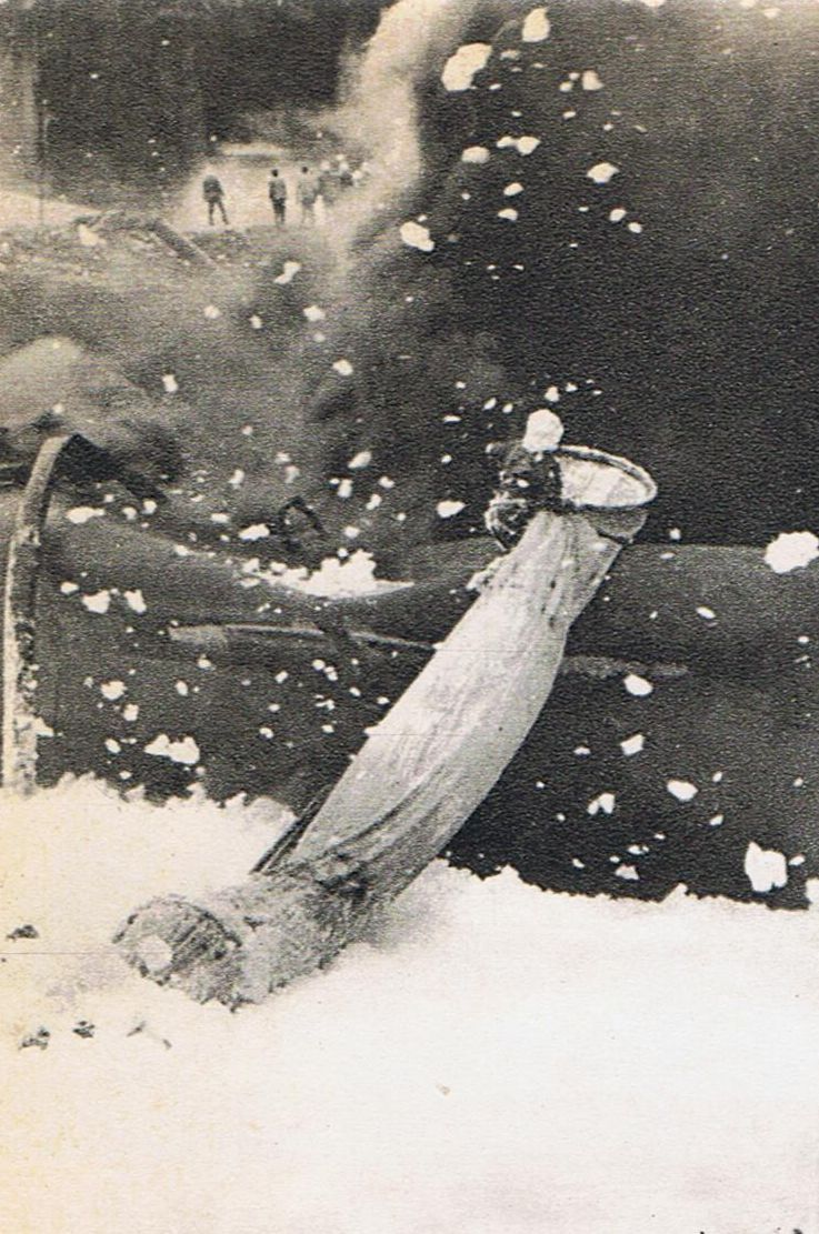 Zdjęcia z pożaru Rafinerii Czechowice Dziedzice w czerwcu 1971 r.